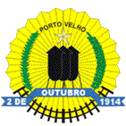 Brasão do município de Porto Velho, Rondônia, Brasil.